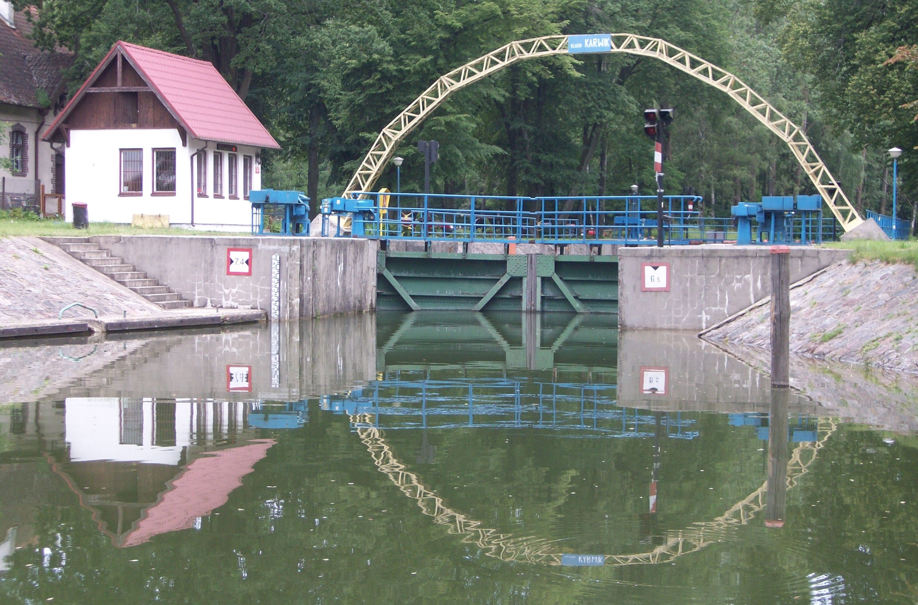 Śluza Karwik - widok od strony południowej.